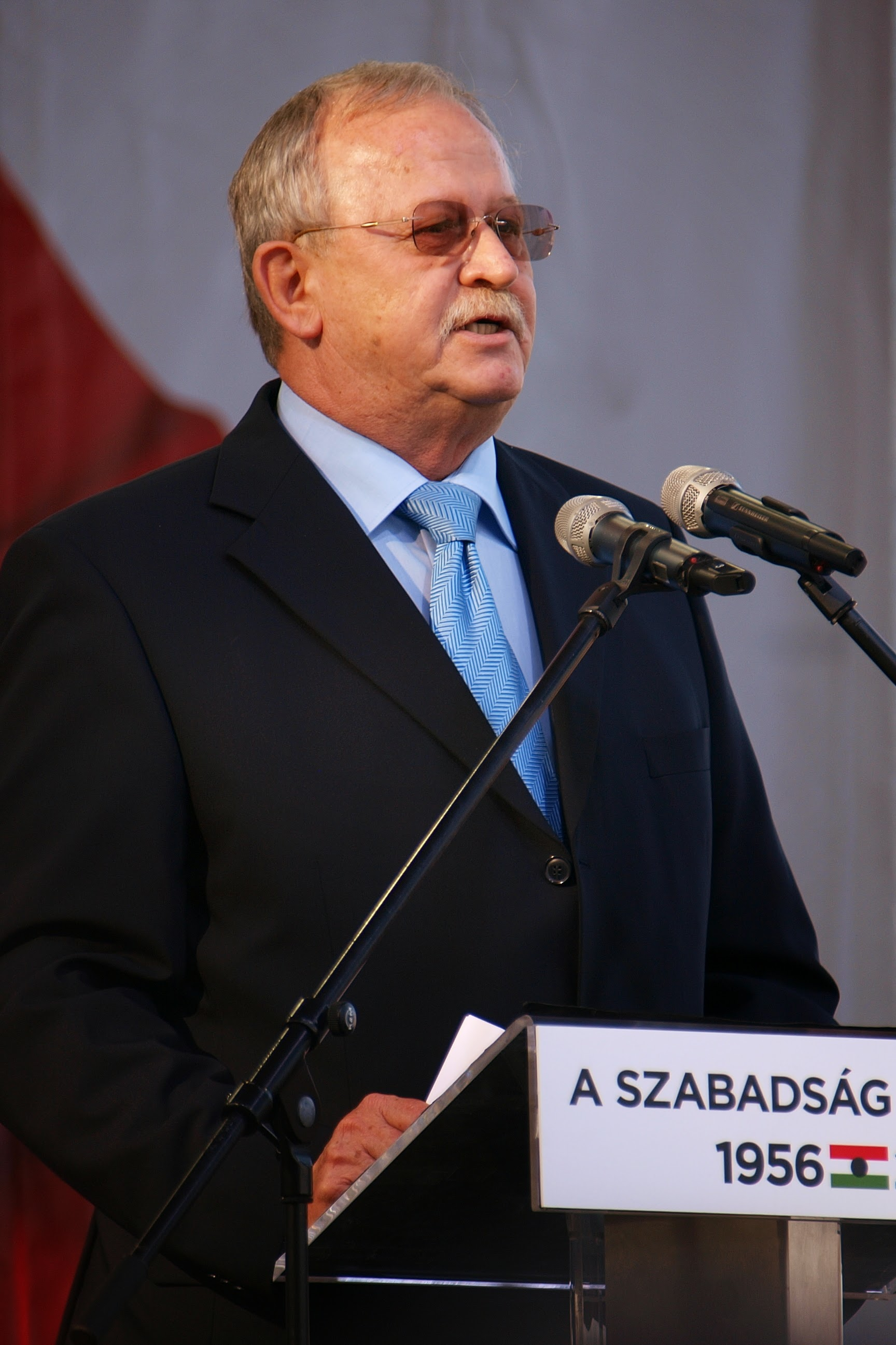 Kuncze Gábor 2013. okt. 23-án